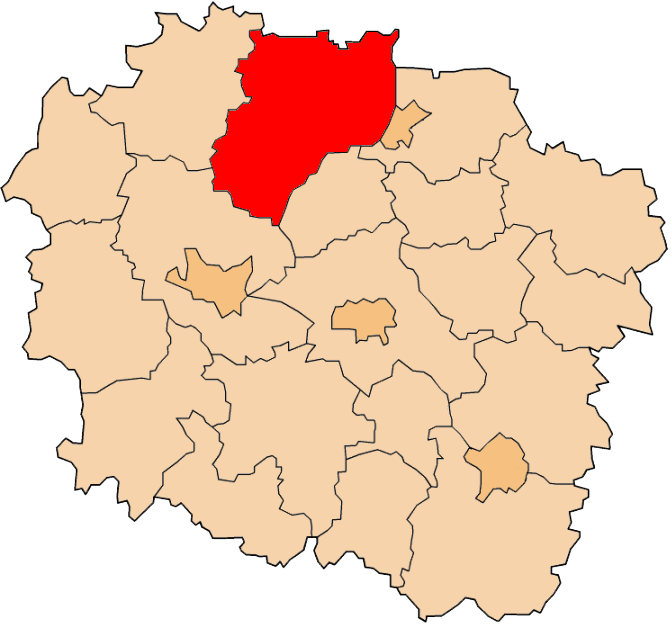 Powiat świecki na mapie województwa kujawsko-pomorskiego.